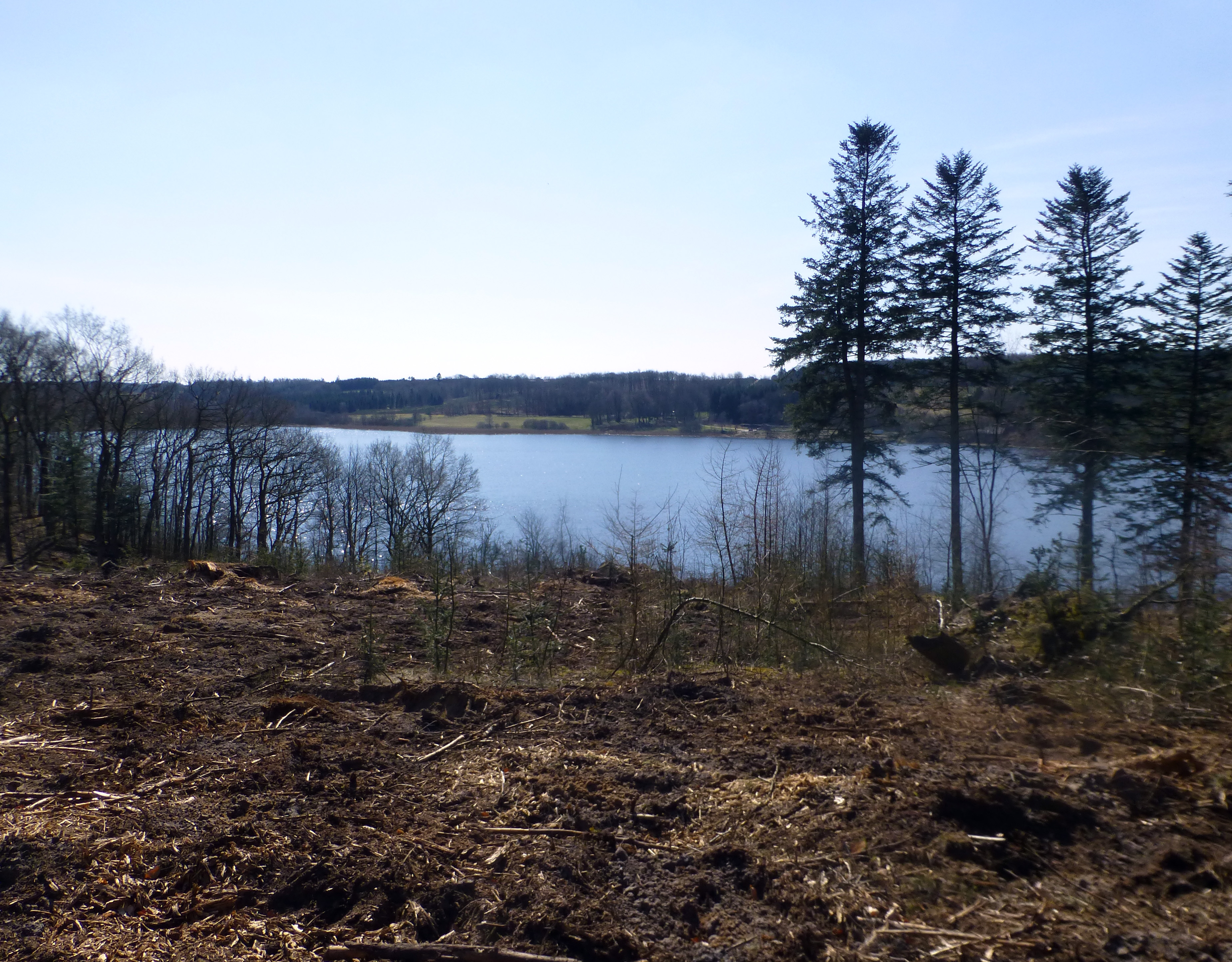 Halle Sø ved Mattrup Å